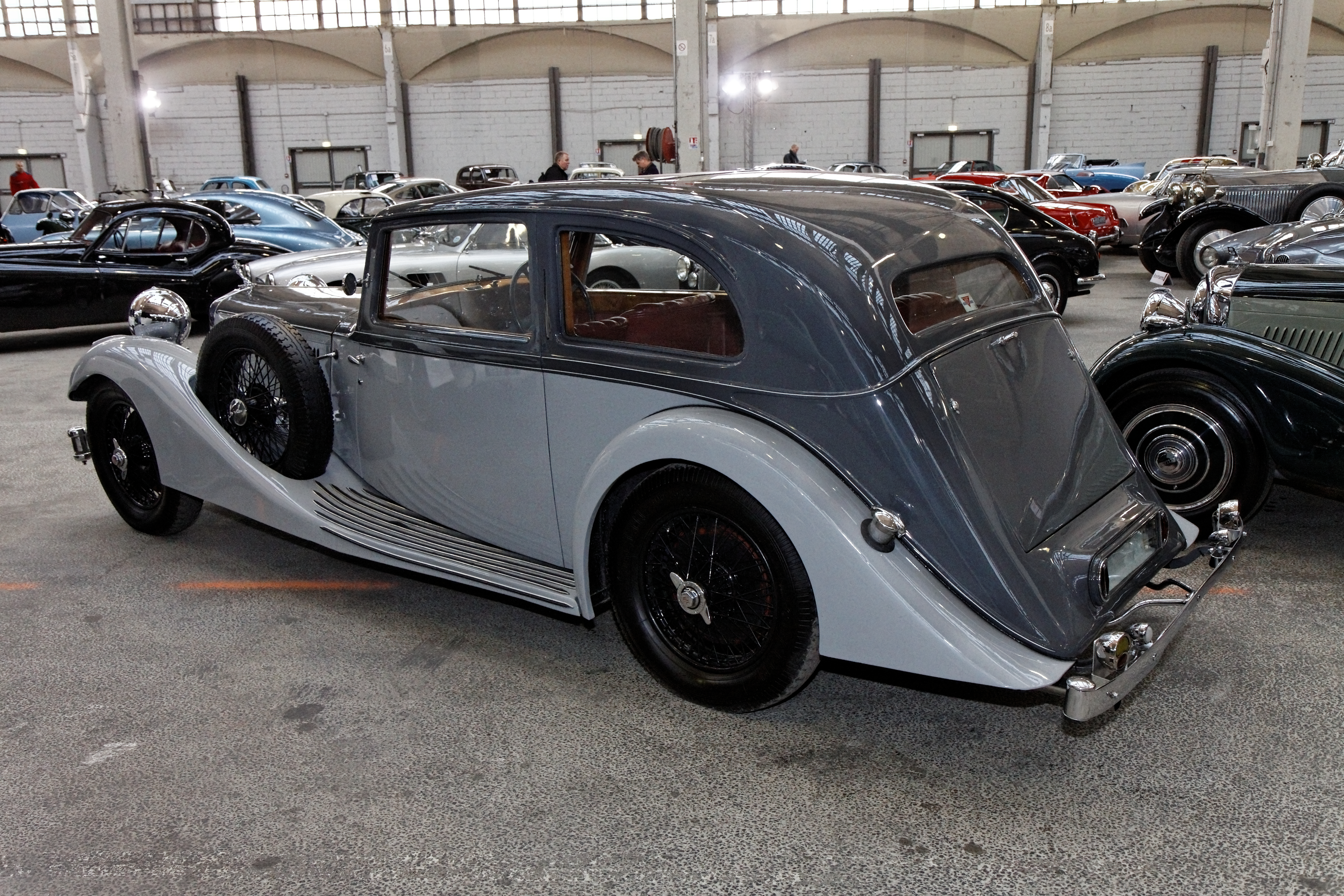 Alvis 4.3-Litre 'Long Bonnet' Sports Saloon